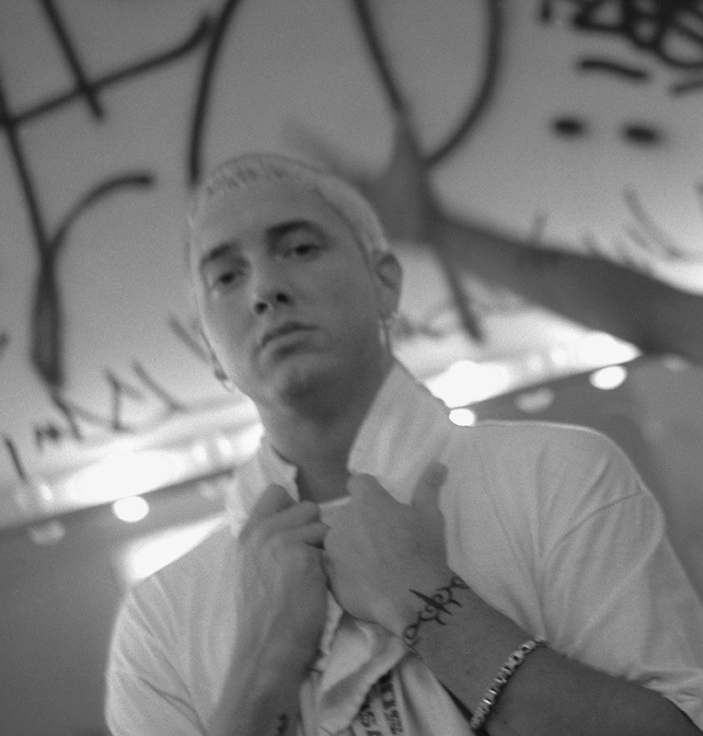 backstage in Munich/Germany 31.10.1999